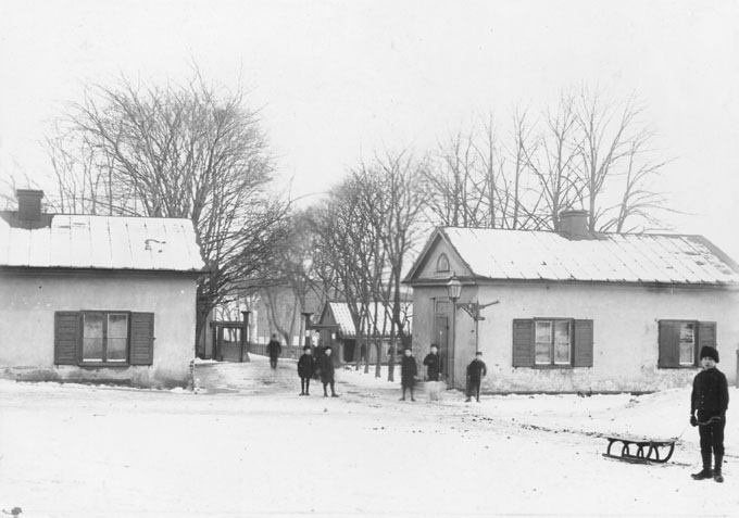 Grindstugorna vid Ladugårdslands Tull strax före rivning